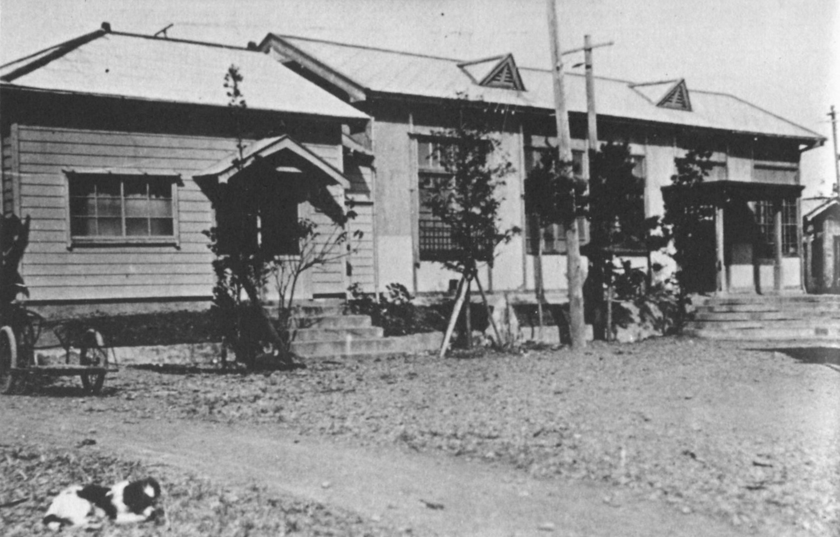 御坊臨港鉄道(現・紀州鉄道)本社と紀伊御坊駅。出典書籍に撮影日の記載は無いが、毎日フォトバンクで閲覧出来る同一写真に記載がある。